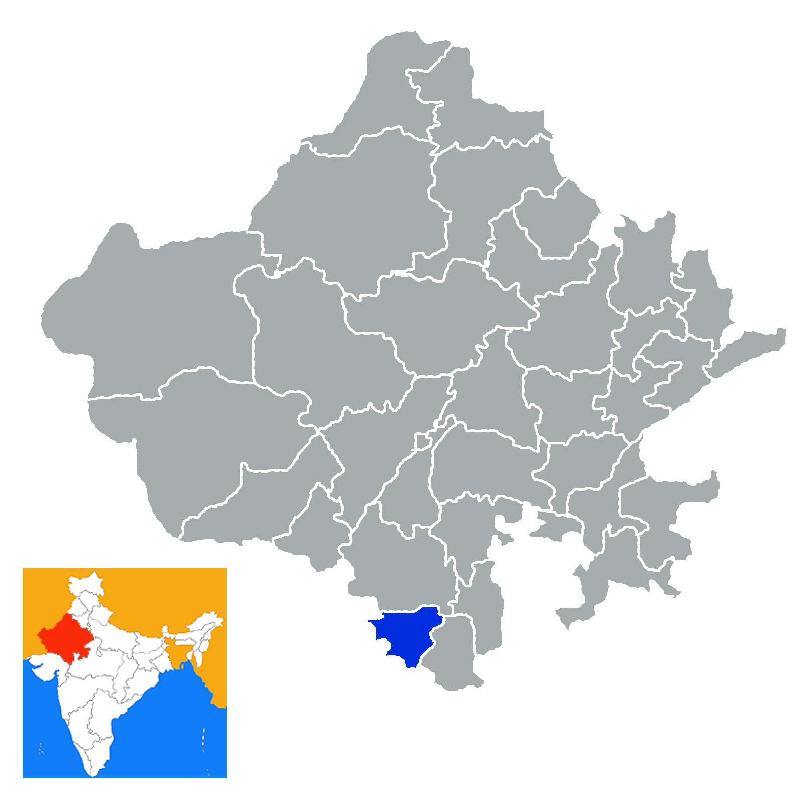 Distrito de Dungapur Rajastan district